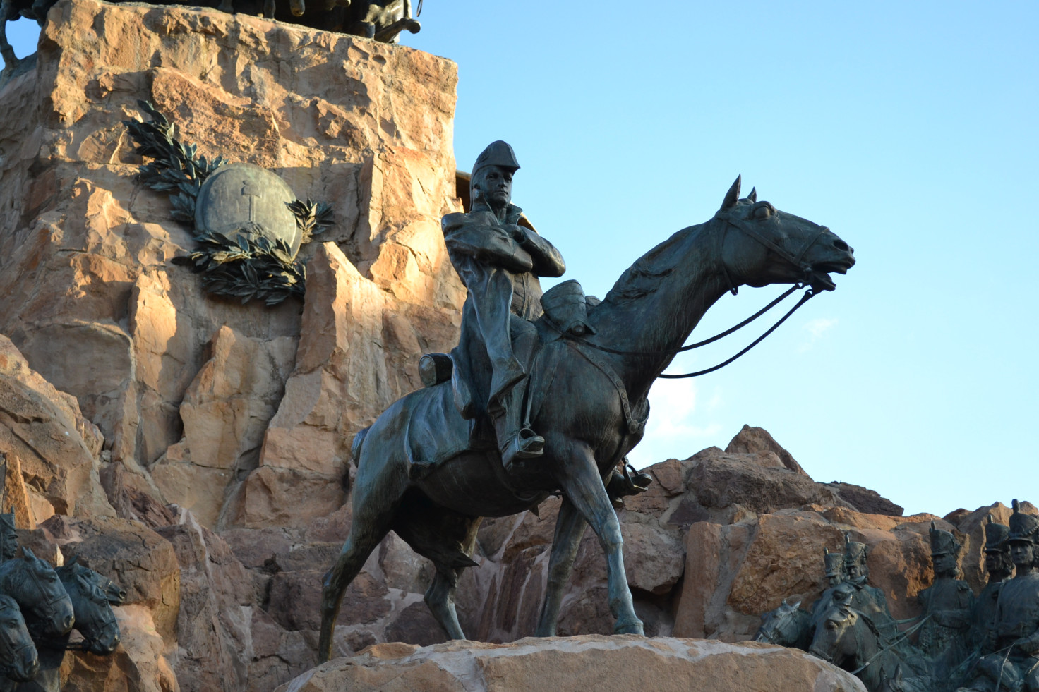 Monumento al Ejercito de los Andes (Cerro de la Gloria), realizado por Juan Manuel Ferrari (1874-1916). Vista detalle Gral. San Martin.